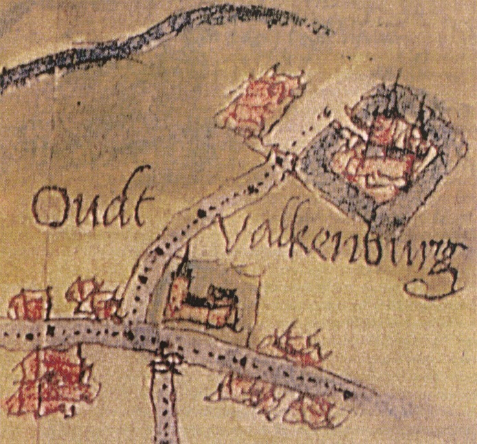 Alt-Valkenburg auf der Karte Jacob van Deventers